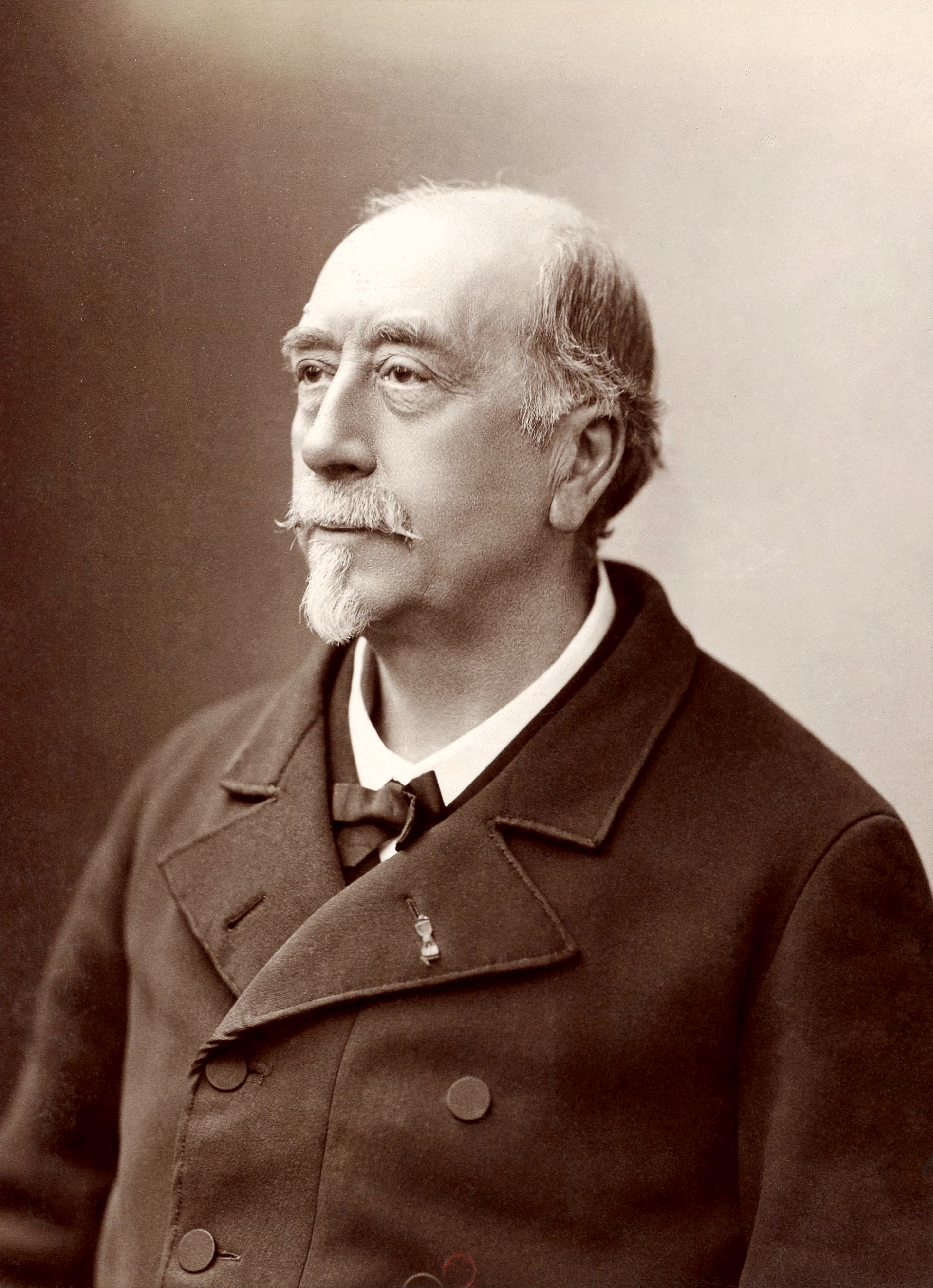 Portrait photographique de Louis Figuier (1819–1894), écrivain et vulgarisateur scientifique français par Nadar.